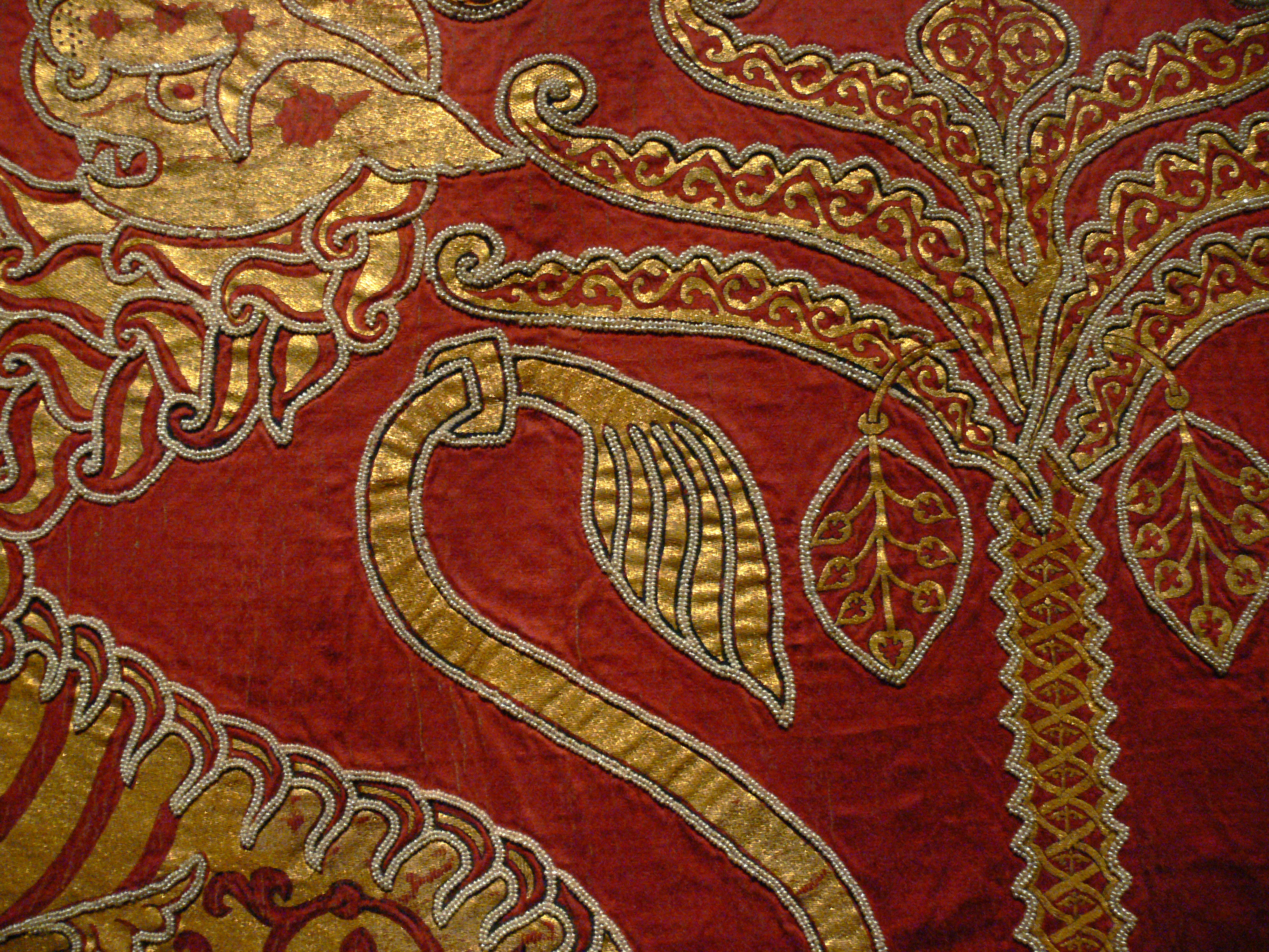 Detail vom Krönungsmantel des heiligen römischen Reichs, Weltliche Schatzkammer, Wien